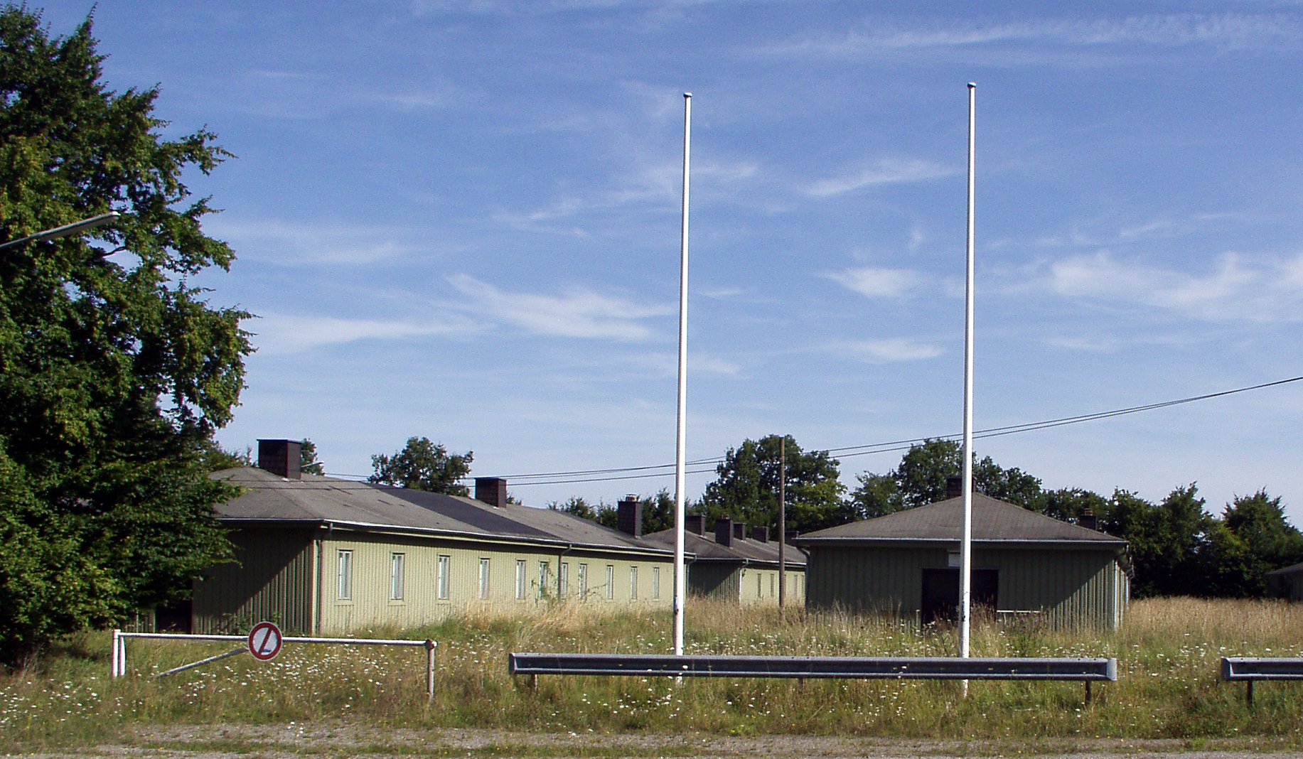 Eskaut